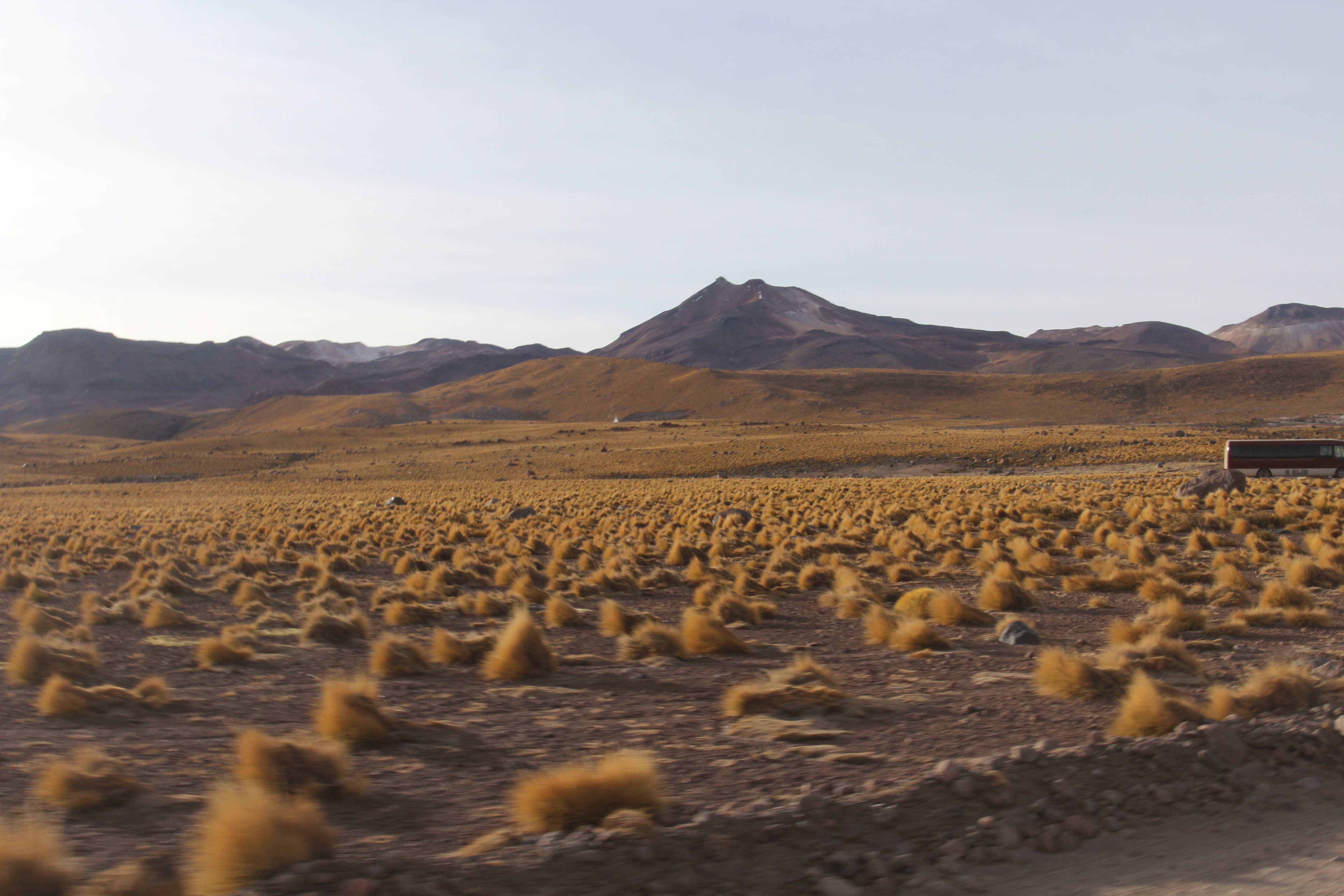 Bienes Nacionales entrega a comunidades atacameñas concesión de uso gratuito de Geysers del Tatio